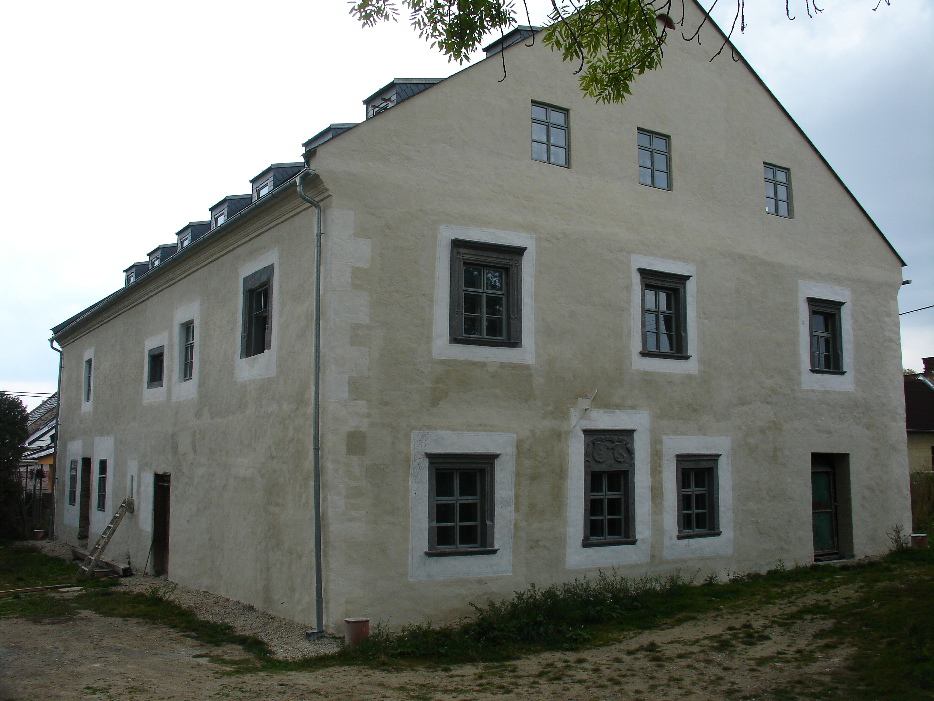 Tvrz Kobylků v Podolí (Mohelnice) po rekonstrukci fasády v roce 2008.